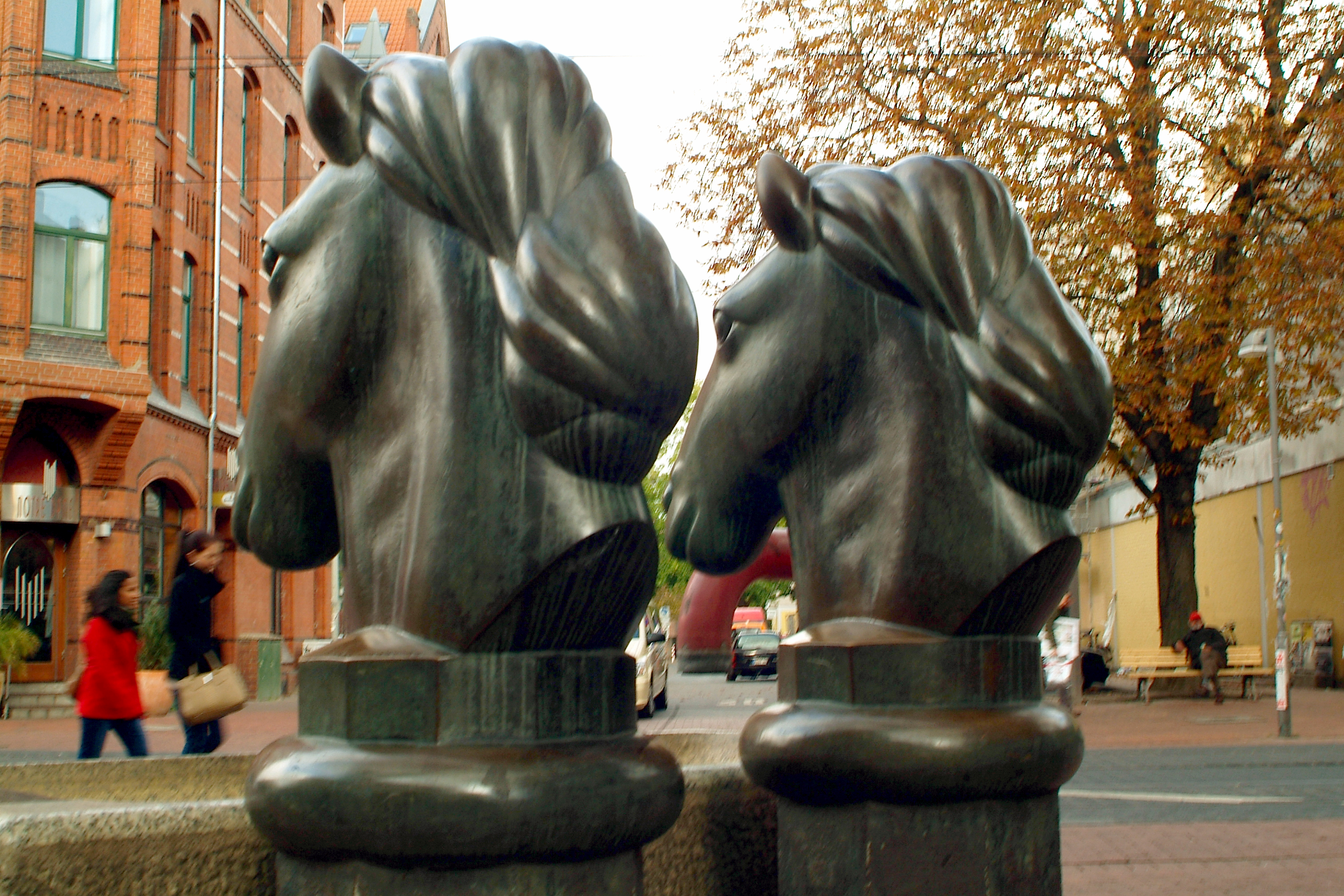 Der 1978 bis 1979 von Max Sauk geschaffene Pferdekutschenbrunnen; Blick auf die Pferdeköpfe von schräg links hinten